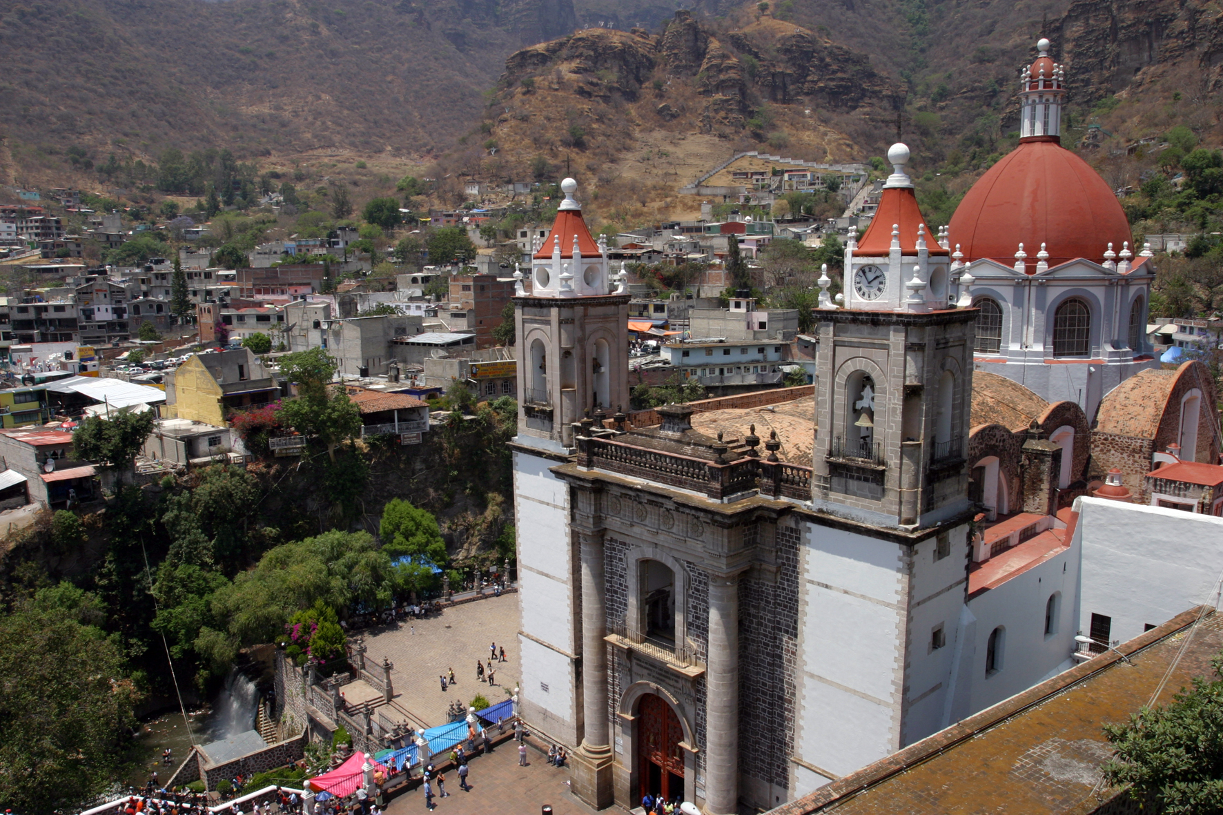 Chalma2